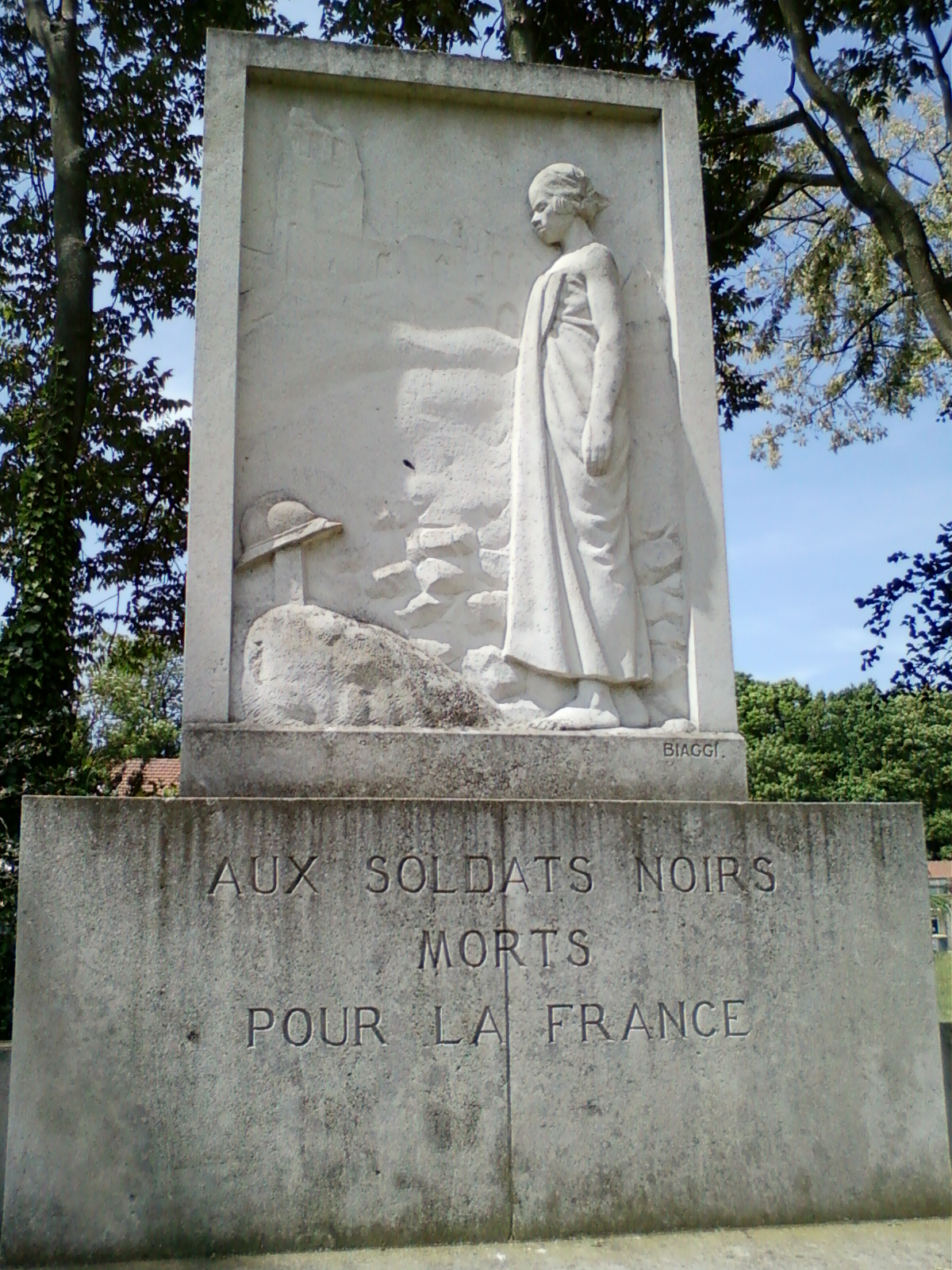 Auguste Biaggi, sculpteur (Les Eaux-Vives, Suisse. Actuel Canton de Genève). "Aux soldats noirs morts pour la France". Monument aux morts de la Première Guerre mondiale (1914-1918) placé dans le Jardin d'Agronomie tropicale de Paris. Image issue de l'atelier OpenStreetMap du samedi 7 mai 2011 dans ce lieu.